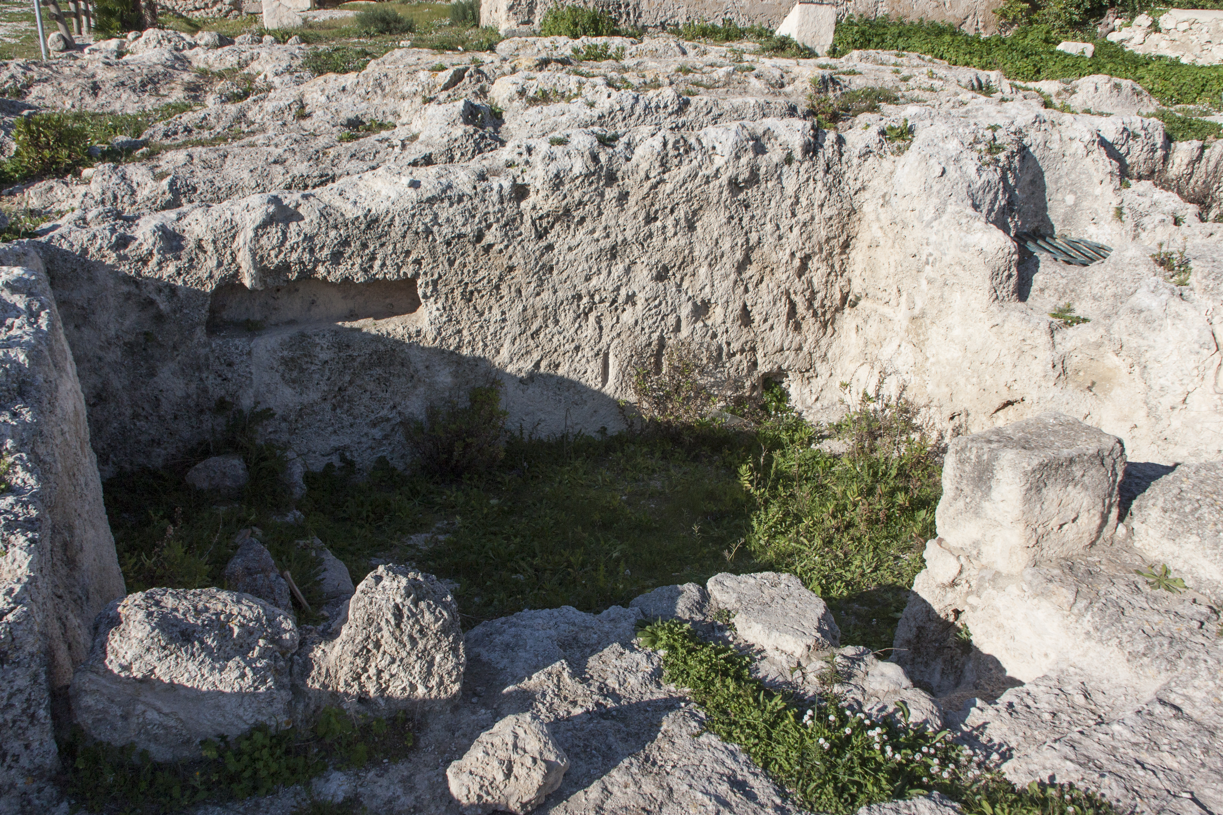 Acropoli di Licata